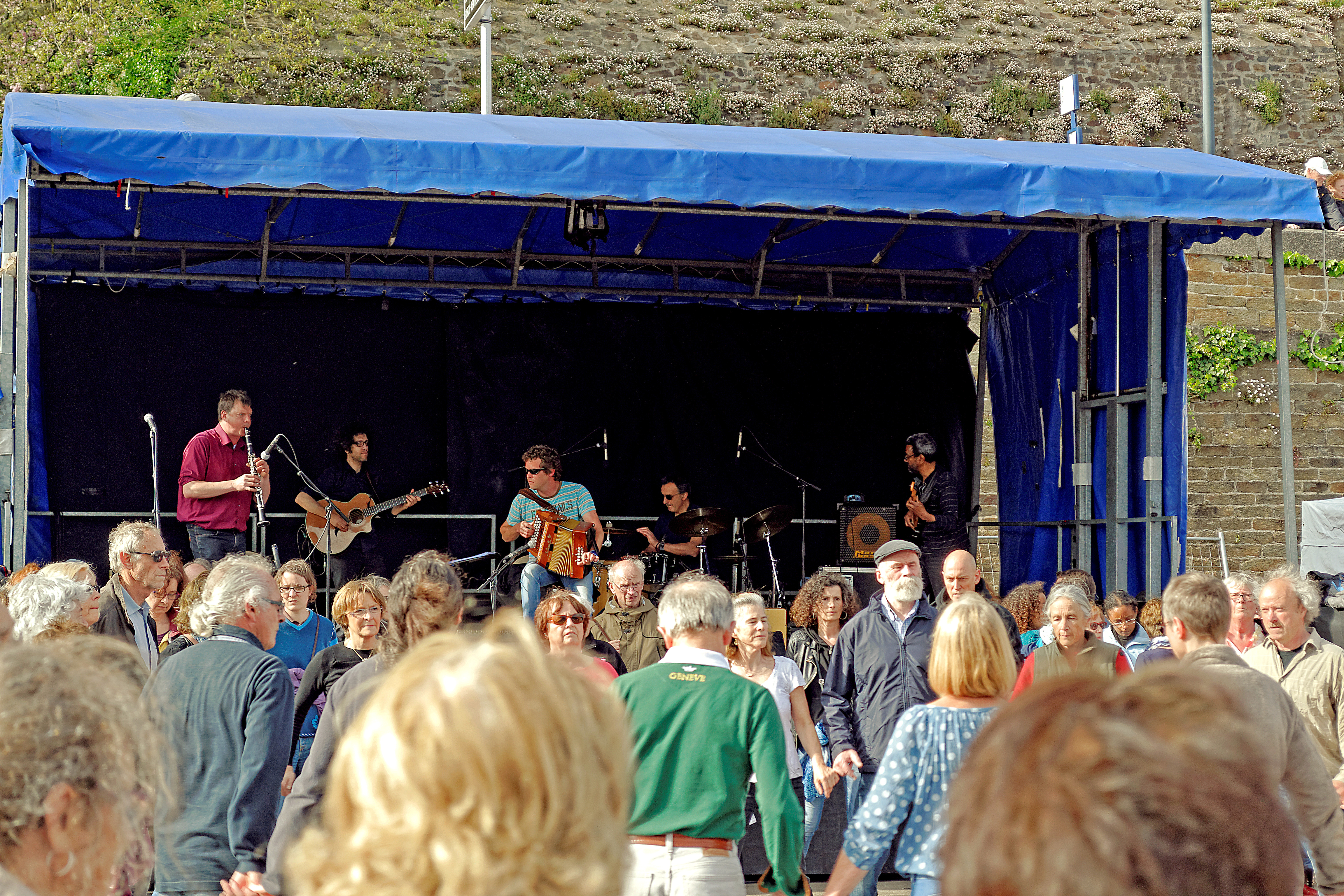 Diwall au Printemps des sonneurs au Parc à Chaînes à Brest le samedi 25 avril 2015.